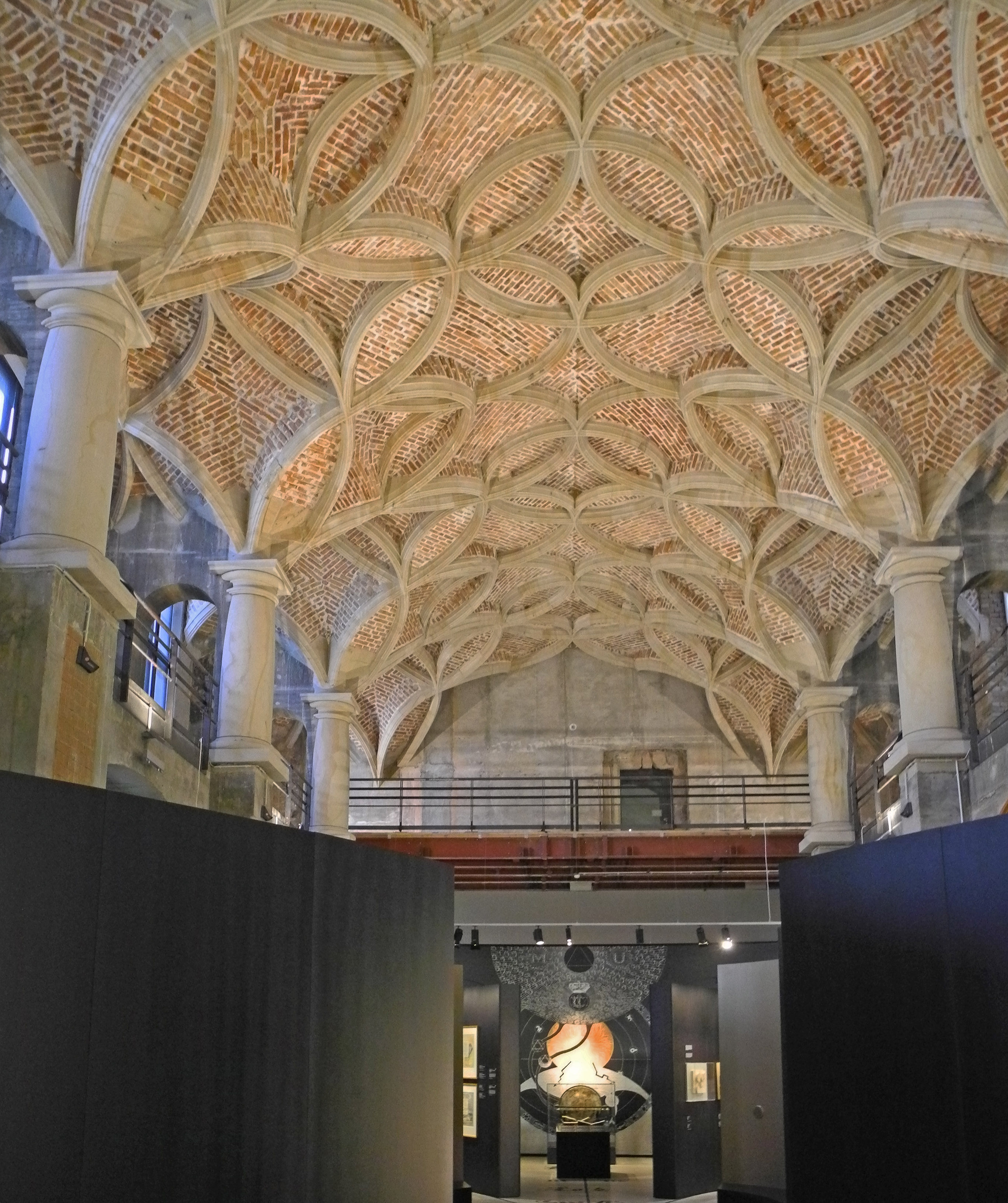 Schlingrippengewölbe der Schlosskapelle im Residenzschloss in Dresden (während der Ausstellung "Alles in Allem" über Jakob Böhme)